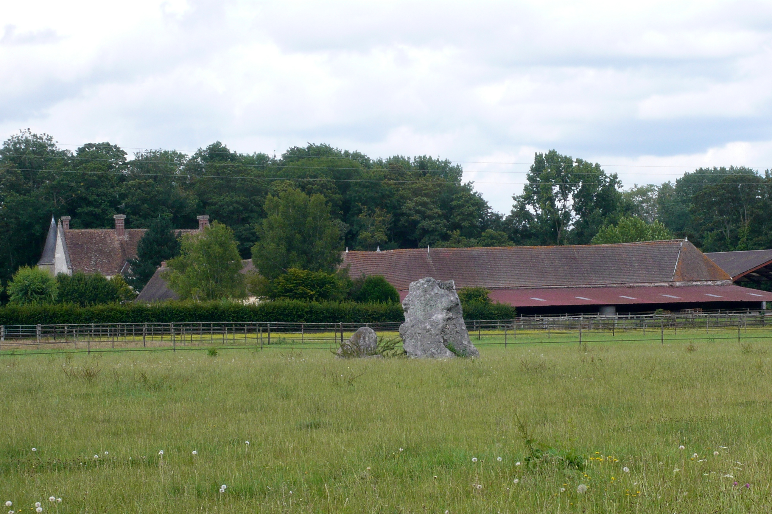 Menhir du But de Gargantua, site de Changé, Saint-Piat, Eure-et-Loir (France).